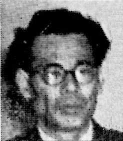 昭和28年刊『日本詩人全集 第九巻』（創元文庫）より。